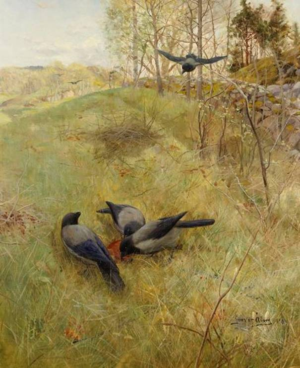 Kråkorna samlas